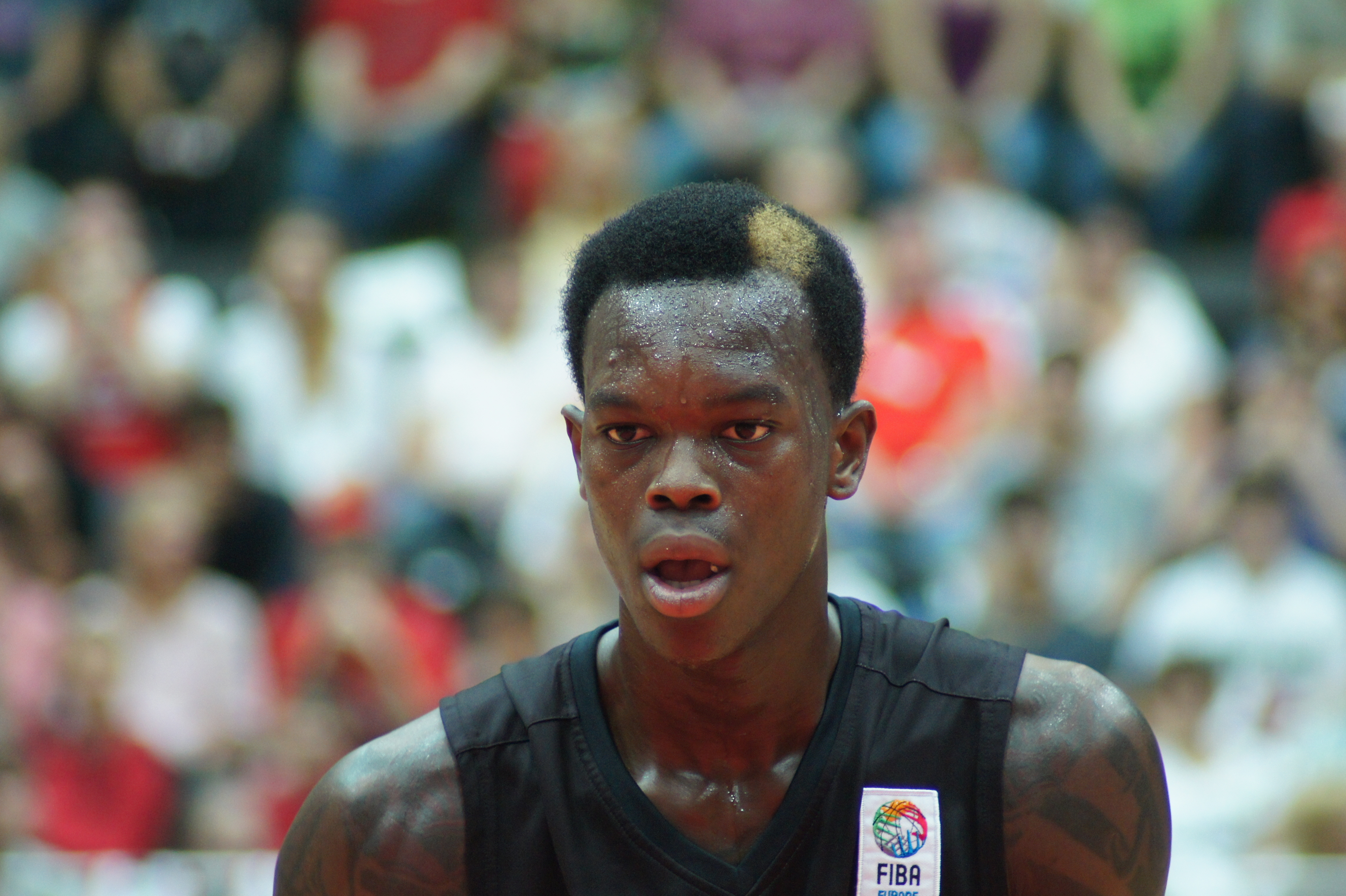 Qualifikationsspiel EuroBasket Österreich - Deutschland, 13. August 2014 im Multiversum Schwechat.